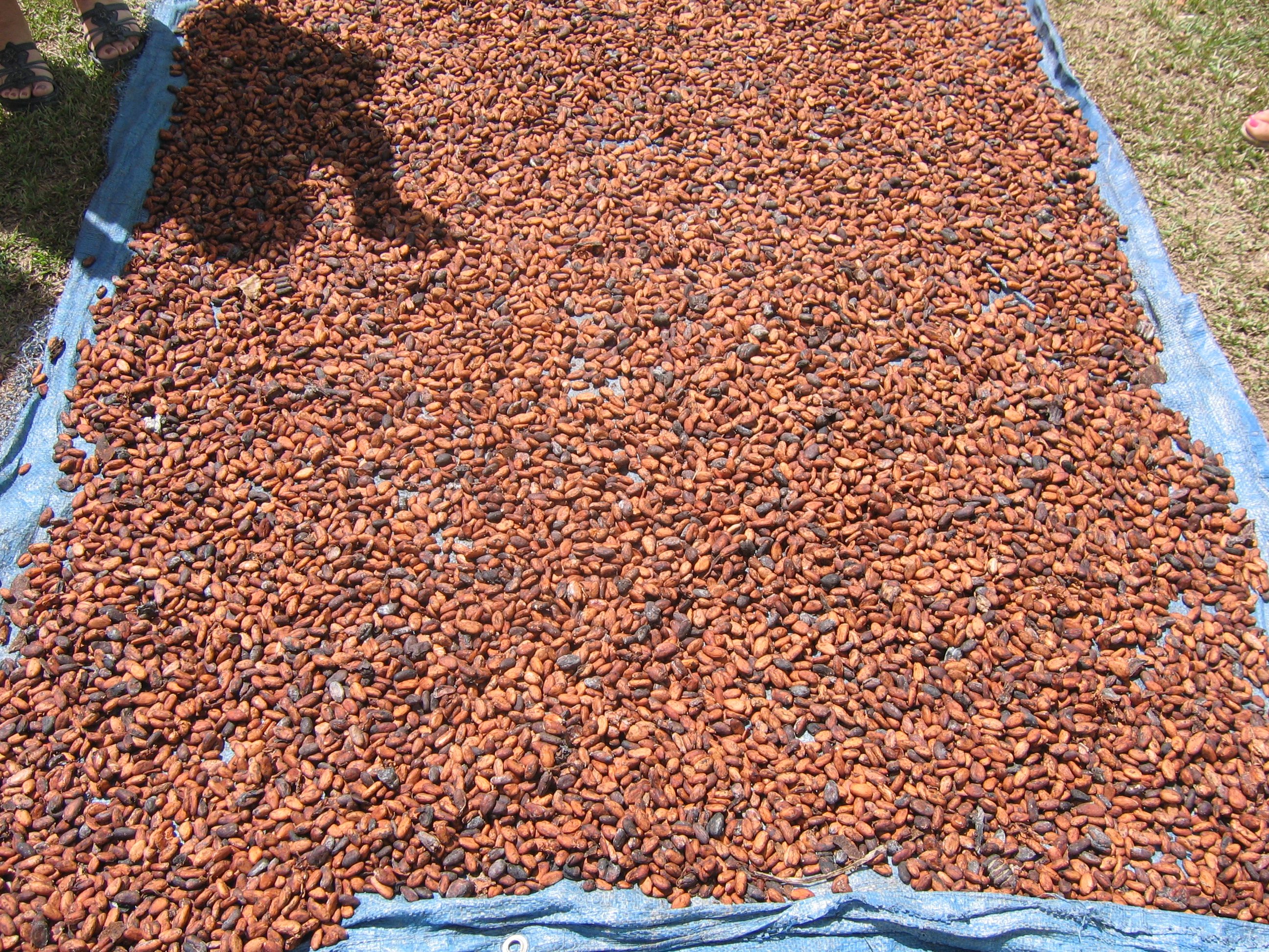 Cocoa